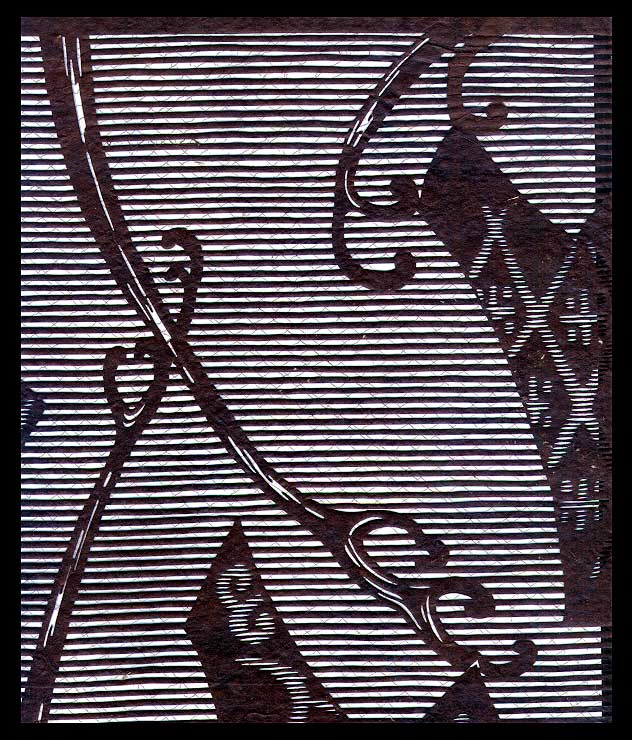 Japanische Schablone um 1900